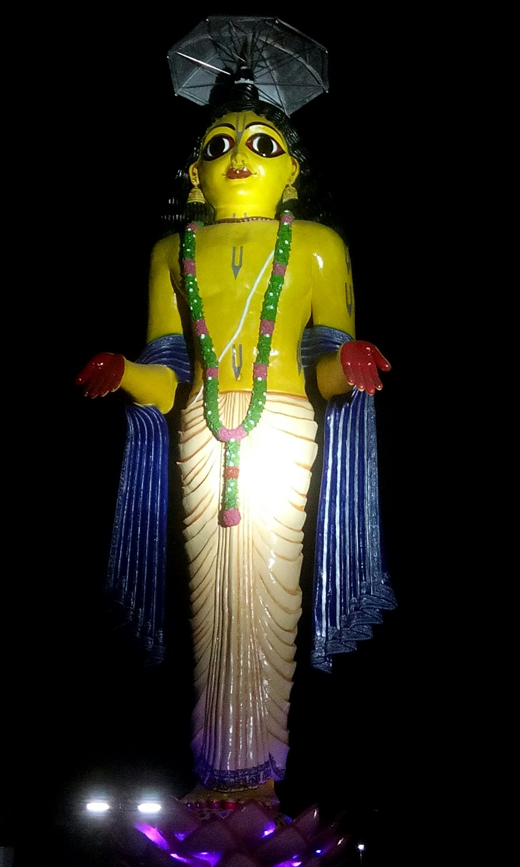 নবদ্বীপের ৬০ ফুটের মহাপ্রভুর মূর্তি